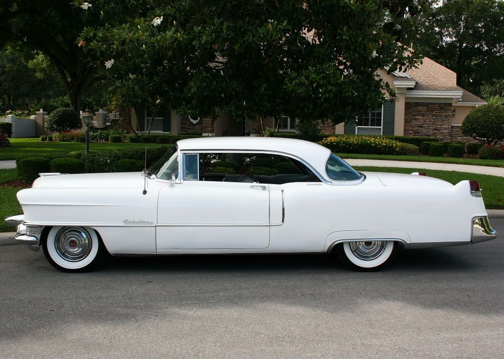 1955 Cadillac Coupe Deville